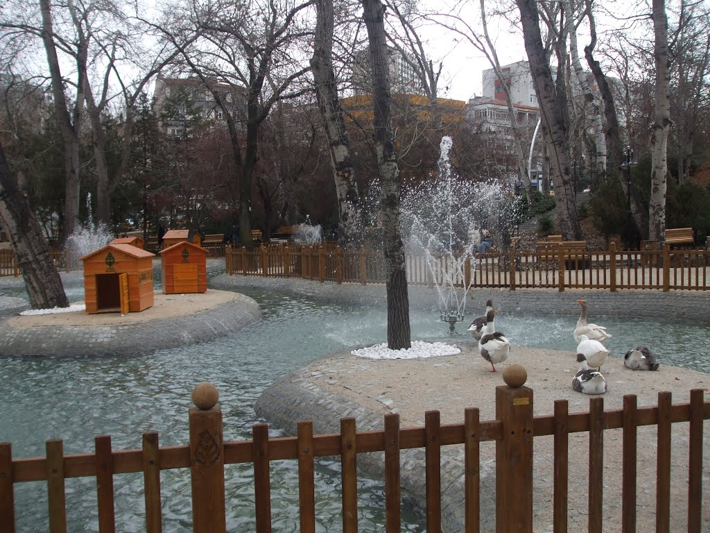 Kuğulu Park panoraması, (Hoşdere) 2013.